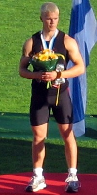 Hannu Ali-Huokuna Kalevan kisoissa, Ratinan stadionilla, Tampereella, 26. heinäkuuta 2008